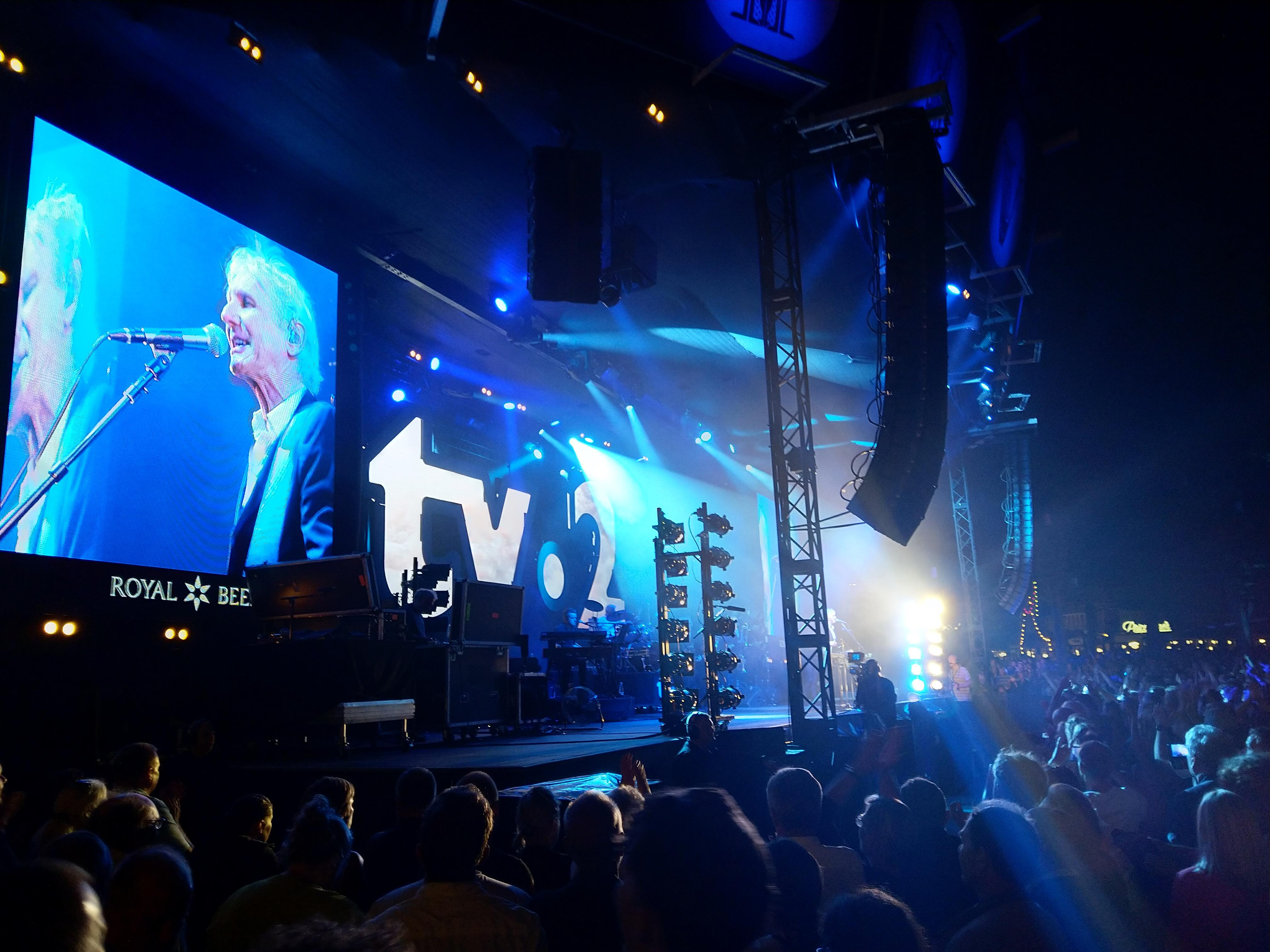 Steffen Brandt sammen med bandet tv-2 ved koncert i Tivoli i København d. 28. juni 2019